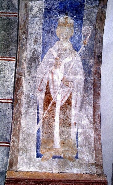 Stehag kyrka i Skåne, Sverige. Korbue mod syd, biskop